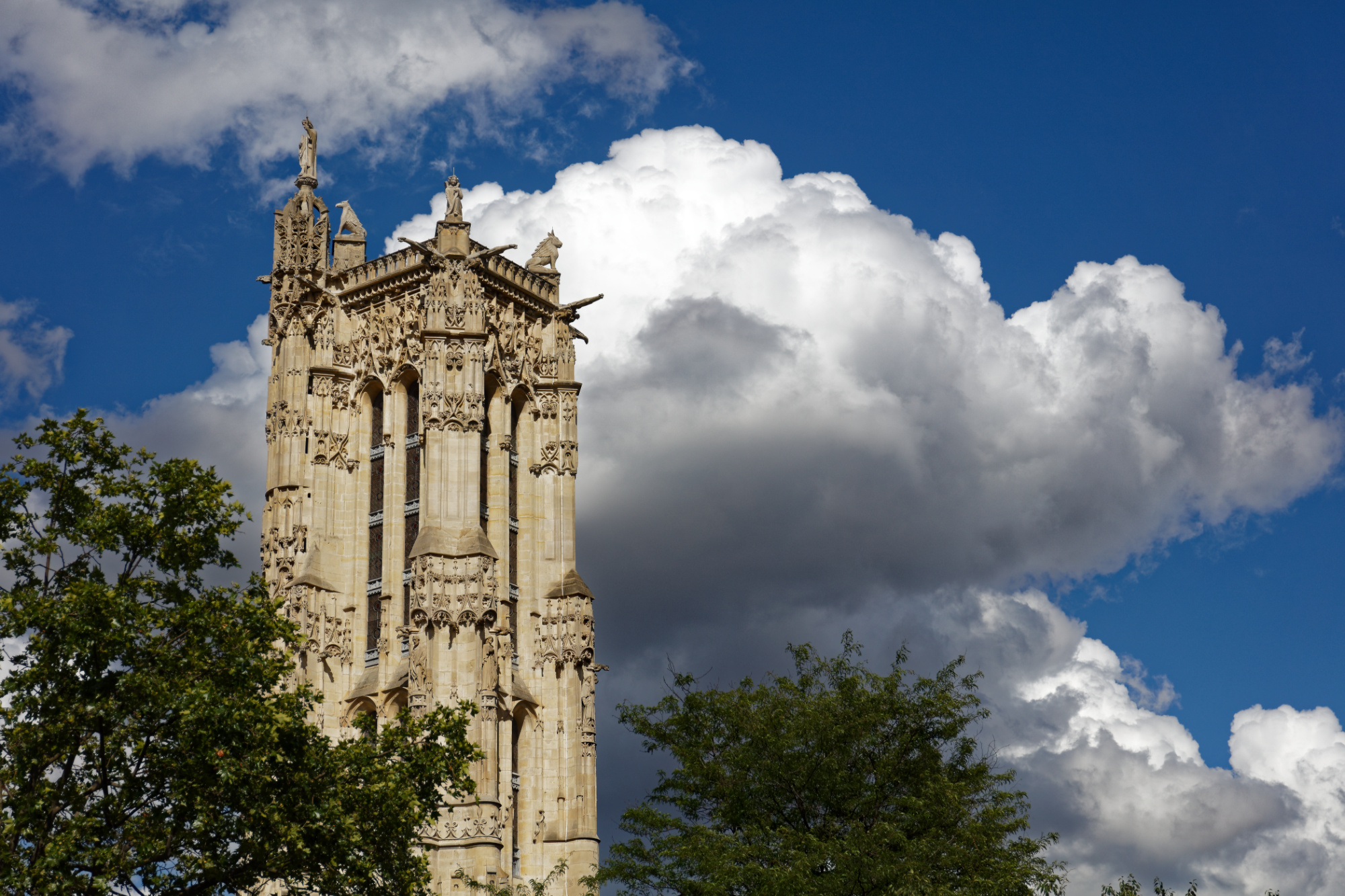 Tour Saint-Jacques .